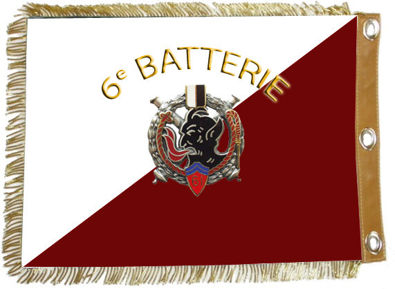 Fanion revers B6